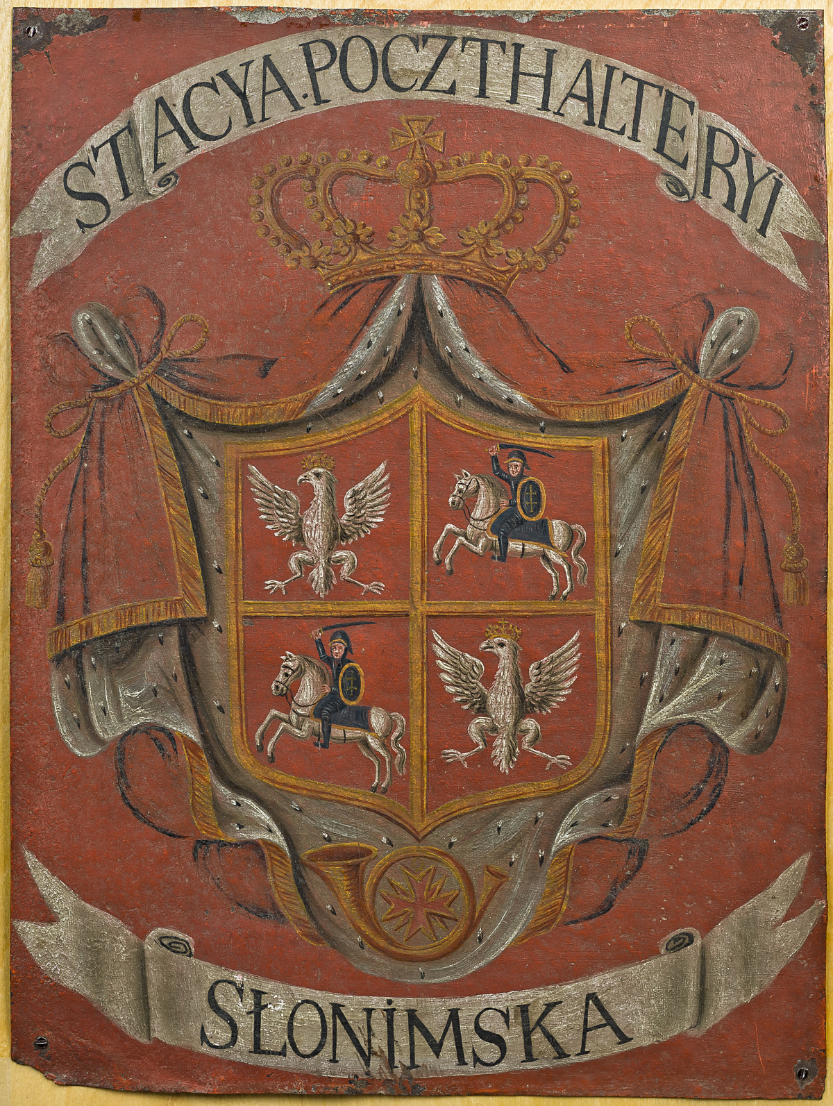 Беларуская (тарашкевіца): Знак Слонімскай паштовай станцыі з гербам «Пагоня» («Pahonia»)